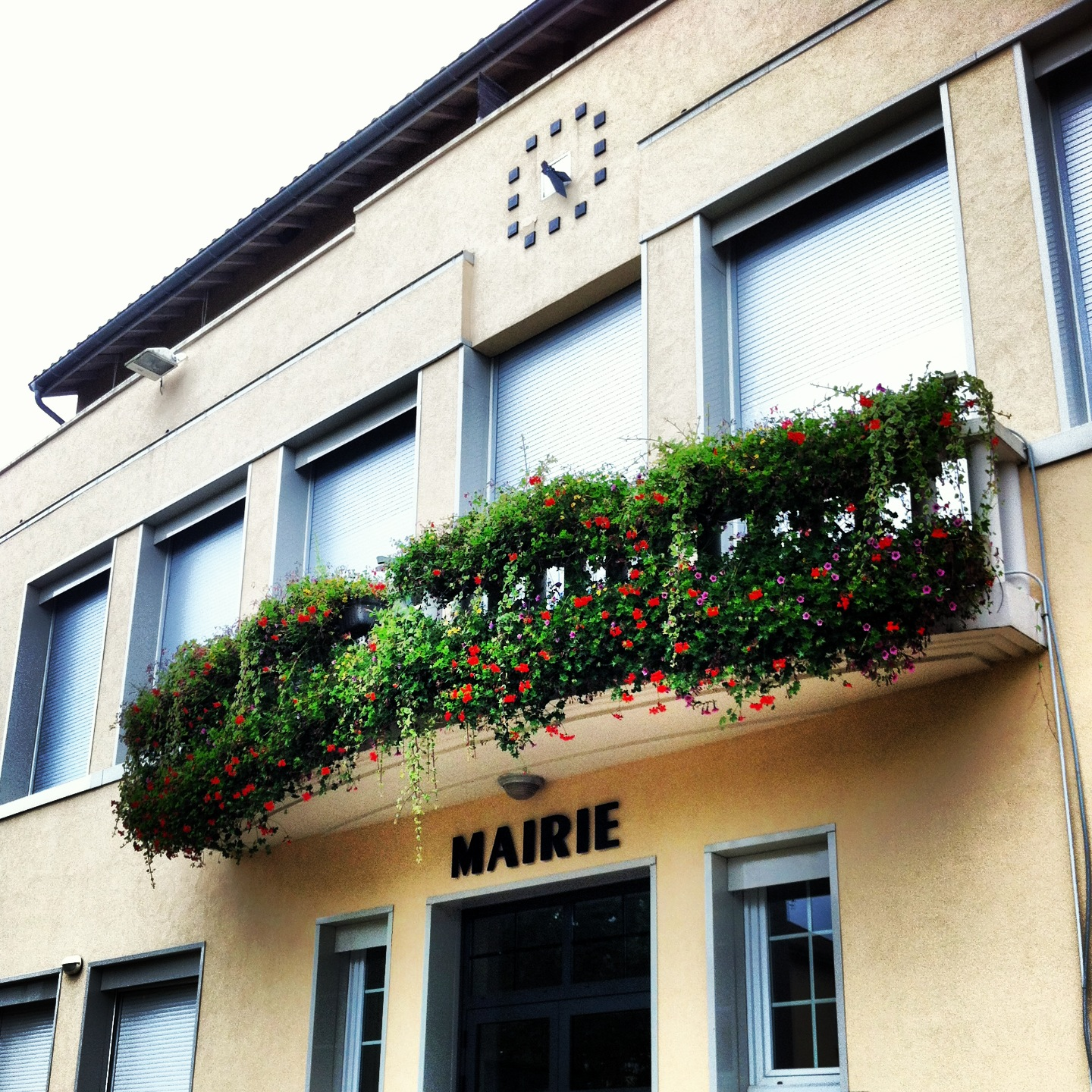 Vue de la façade de la Mairie de Chavannes-sur-Suran (01250)